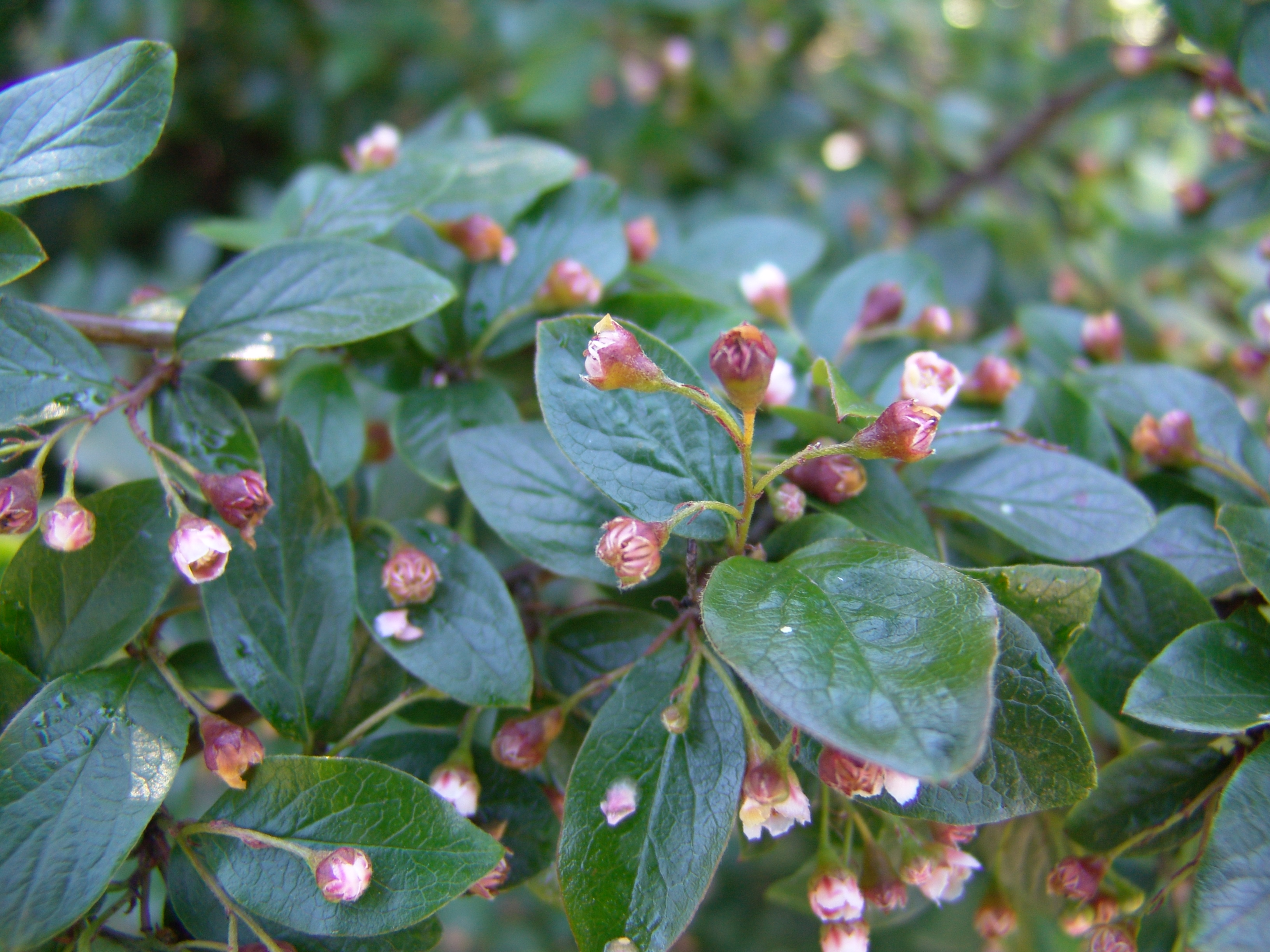 Cotoneaster lucidus, Botanischer Garten Akureyri, Island.